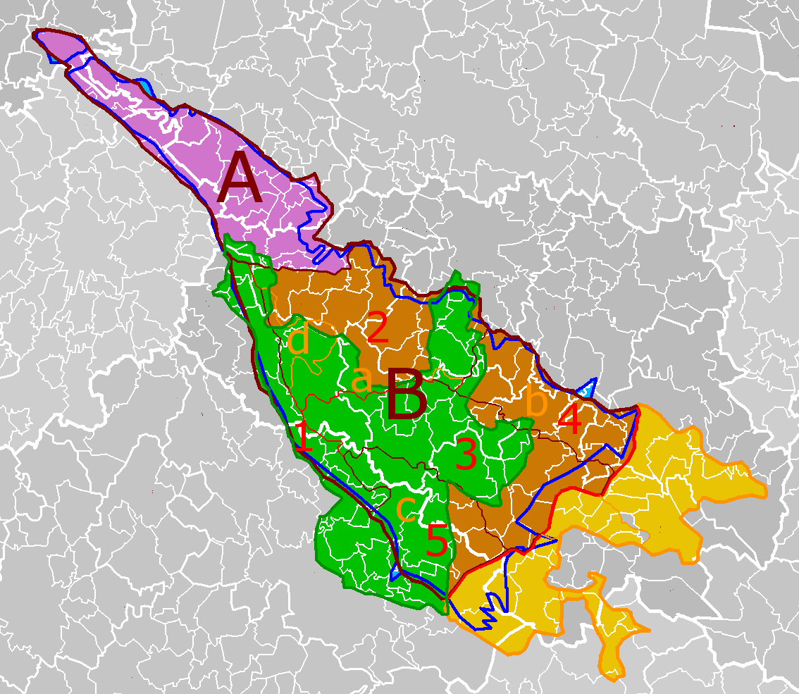 Poloha, různé definice a členění Železných hor na podkladové mapě územněsprávního členění okresu Chrudim a okolí. Geologické vymezení Železných hor Geomorfologické vymezení a členění Železných hor (nesporné hranice) Geomorfologické vymezení a členění Železných hor (Hruška 2000) Geomorfologické vymezení a členění Železných hor (Portál veřejné správy) Chvaletická pahorkatina Sečská vrchovina Území někdy přičleňované k Sečské vrchovině (Portál veřejné správy) Rozsah CHKO Železné hory Geomorfologické členění Hercynský systém Hercynská pohoří I Česká vysočina I2 (II) Česko-moravská subprovincie I2C (IIC) Českomoravská vrchovina I2C-3 (IIC3) Železné hory I2C-3-A (IIC3-A) Chvaletická pahorkatina I2C-3-B (IIC3-B) Sečská vrchovina (varianta dle Hruška 2000) I2C-3-B-1 (IIC3-B-1) Prachovická pahorkatina I2C-3-B-2 (IIC3-B-2) Prachovická pahorkatina I2C-3-B-3 (IIC3-B-3) Nasavrcká vrchovina I2C-3-B-4 (IIC3-B-4) Žumberecká pahorkatina I2C-3-B-5 (IIC3-B-5) Trhovokamienická vrchovina (varianta dle Demek 1987) I2C-3-B-a (IIC3-B-a) Kameničská vrchovina I2C-3-B-b (IIC3-B-b) Skutečská pahorkatina I2C-3-B-c (IIC3-B-c) Stružinecká pahorkatina I2C-3-B-d (IIC3-B-d) Podhradská kotlina